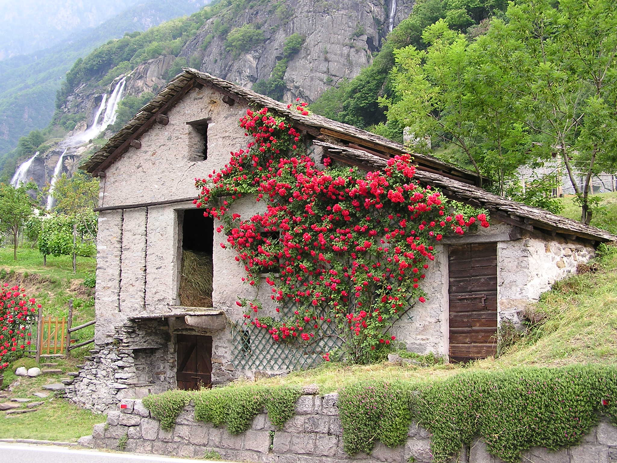 Landwirtschaftsgebäude Ort & Datum: Borgonuova vic. Chiavenna, Mai 2004